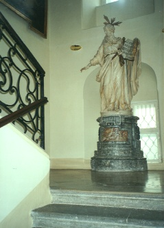 Barnabitenkloster_Prunkstiege